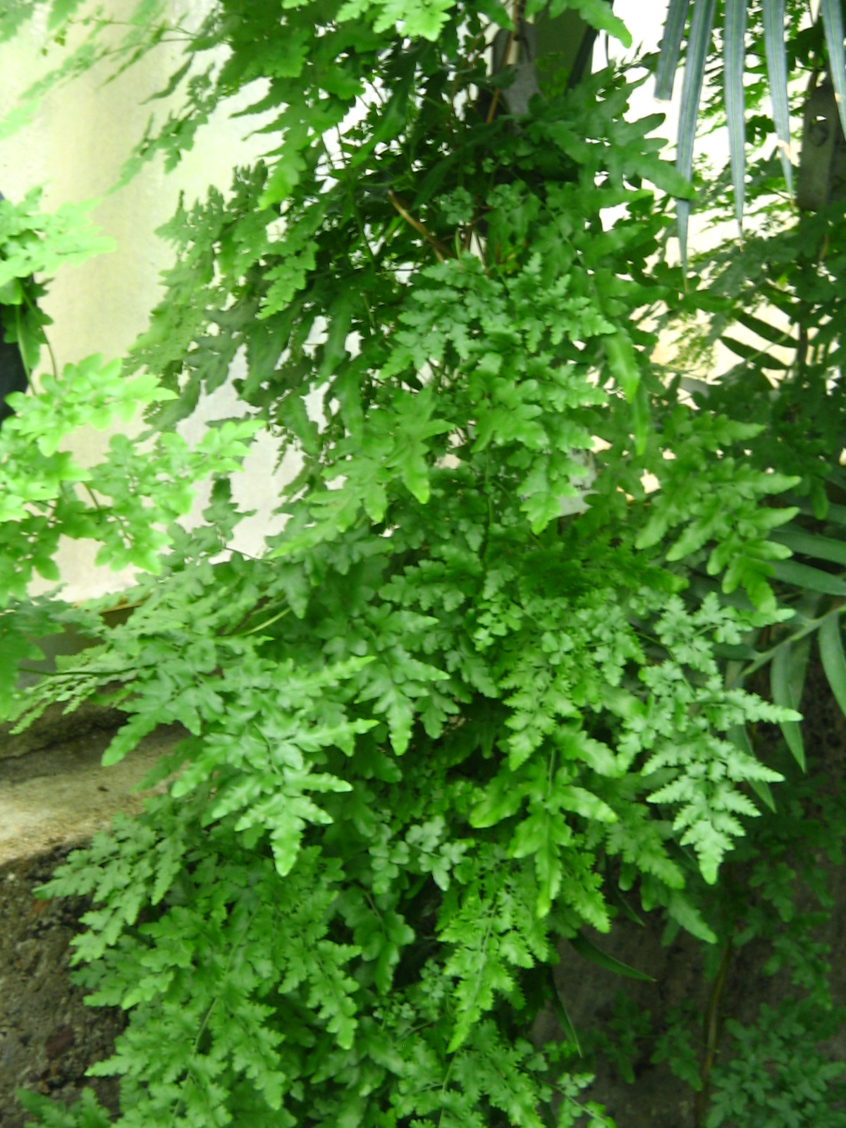 Lygodium scandens in Giessen Botanical Garden, Germany